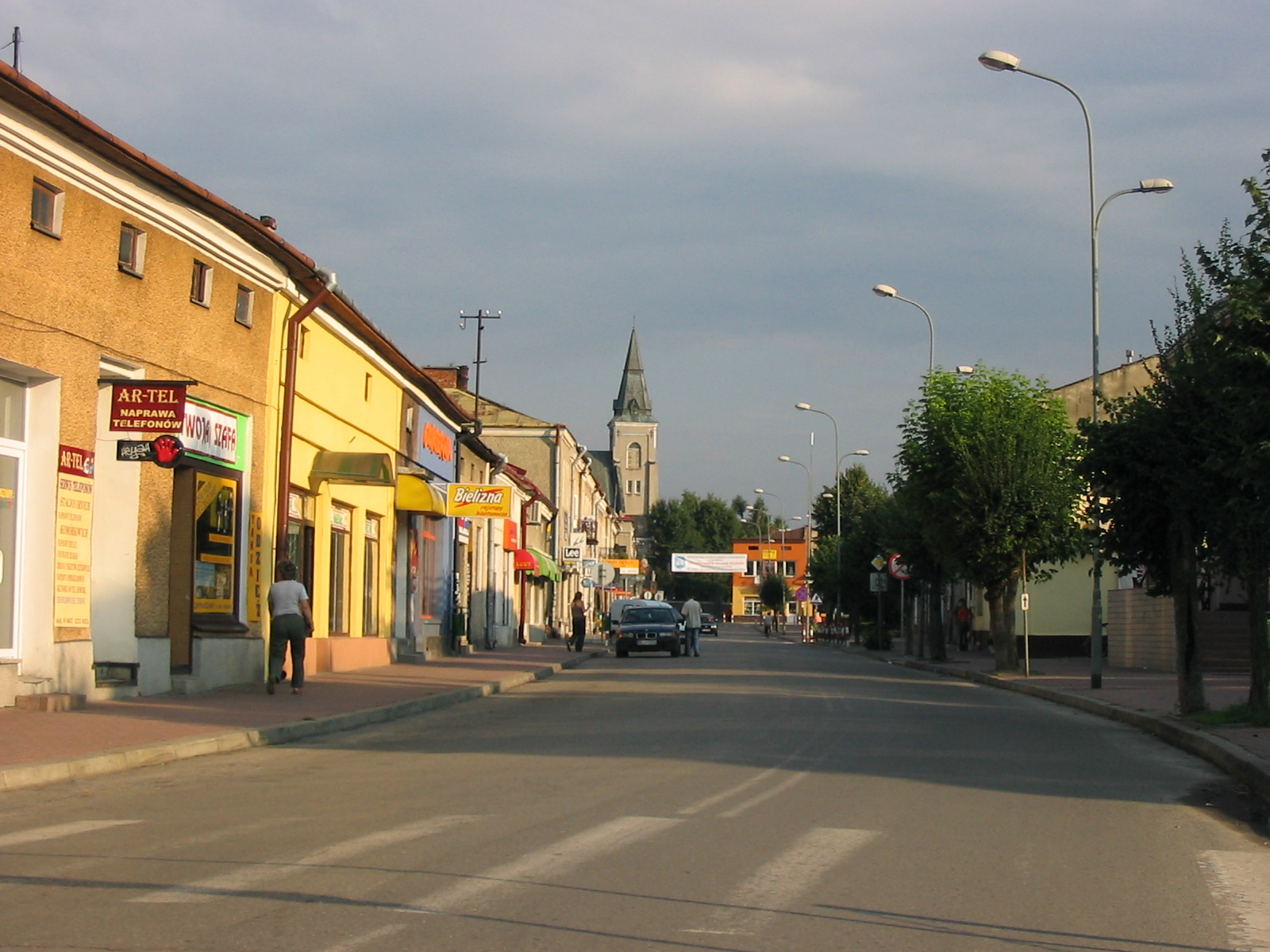 Droga na rynek w Lubaczowie